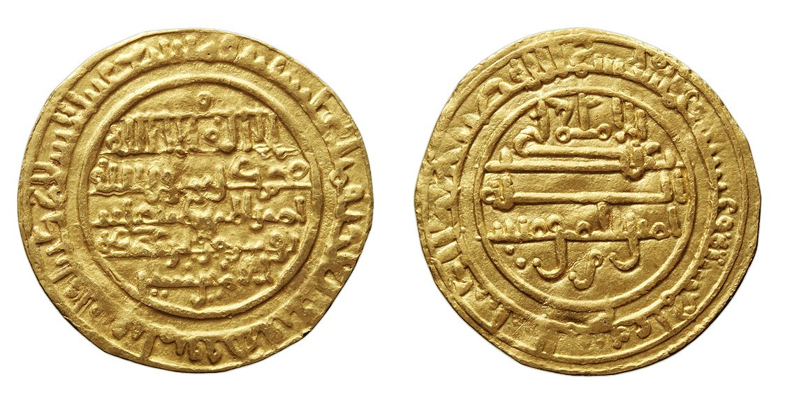 Dinar d'or emès a Almería sota Alí ibn Yússuf. Any 52(6) de l'Hègira.